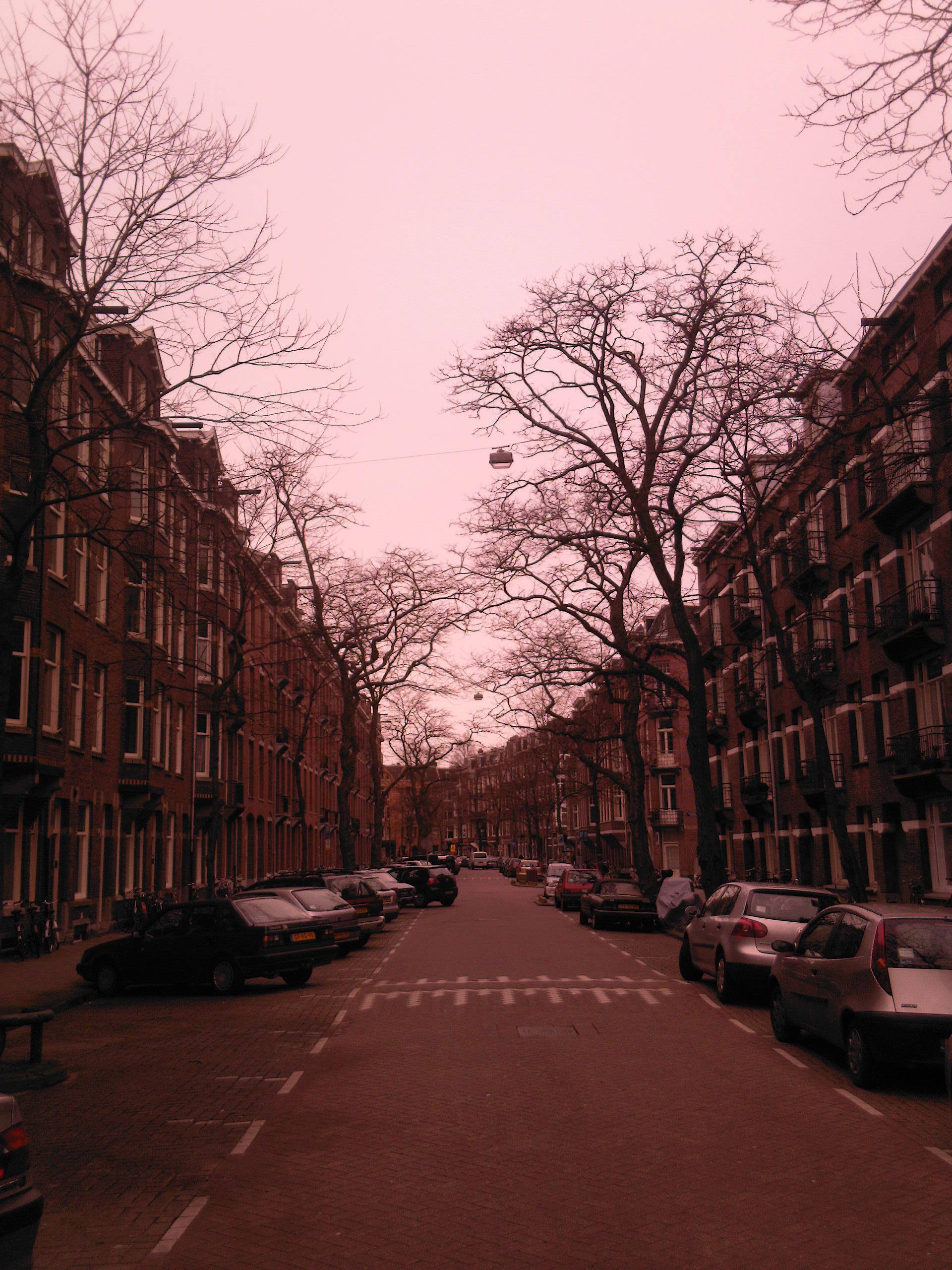 Maarten Harpertszoon Trompstraat, naamgever van de Trompbuurt in de Amsterdamse Baarsjes